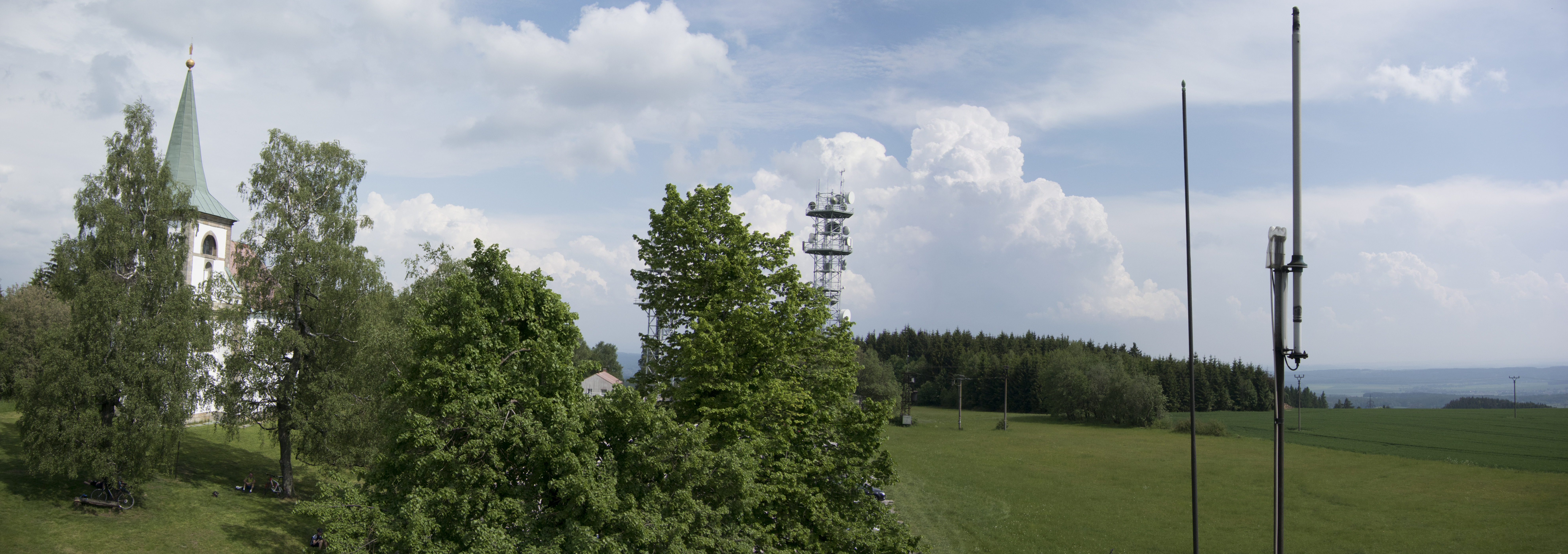 Rozhledna Zvičina z 28.5.2016 Panorama na východ.